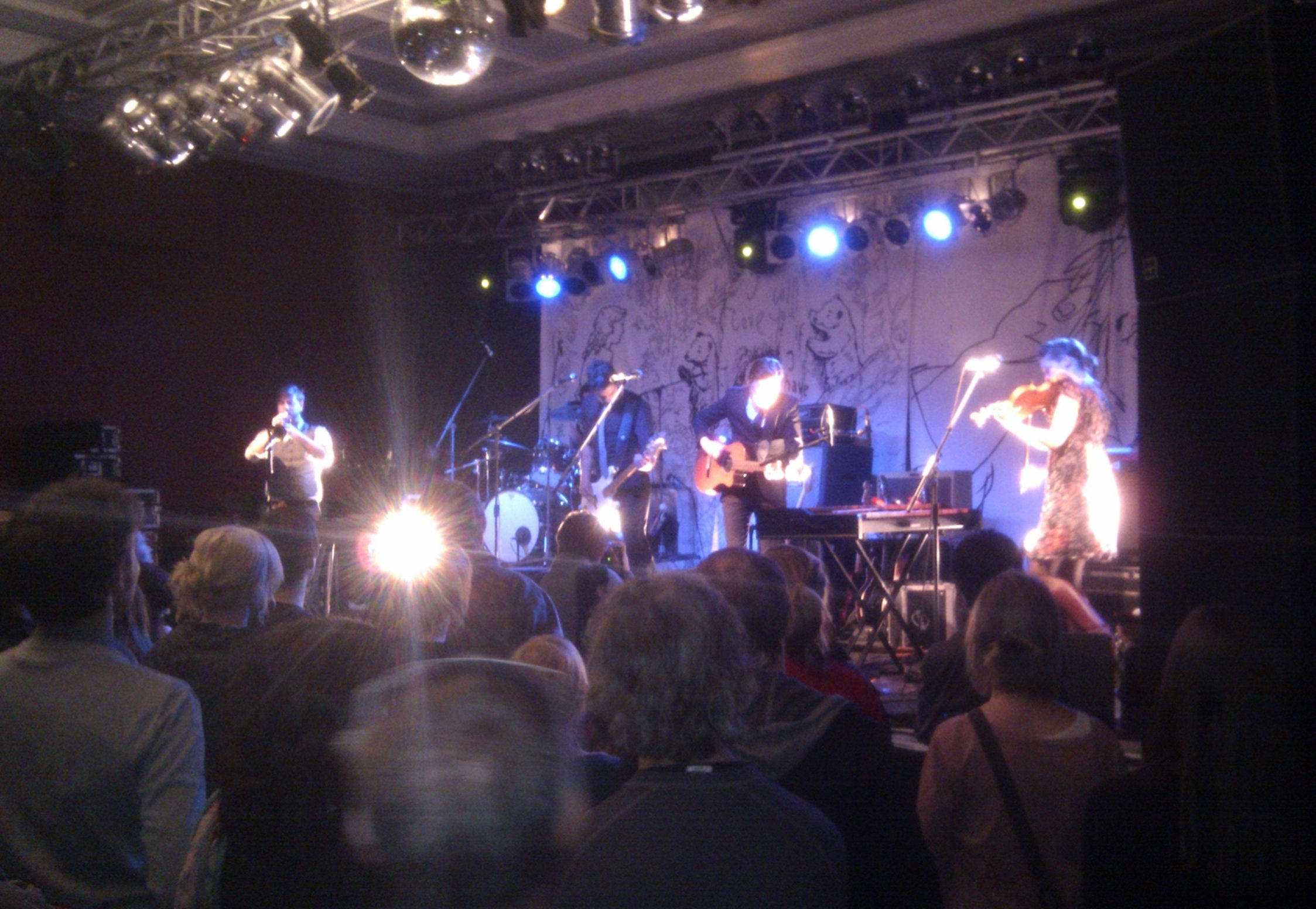 Get Well Soon bei Konzert im HSD in Erfurt am 25.11.2010